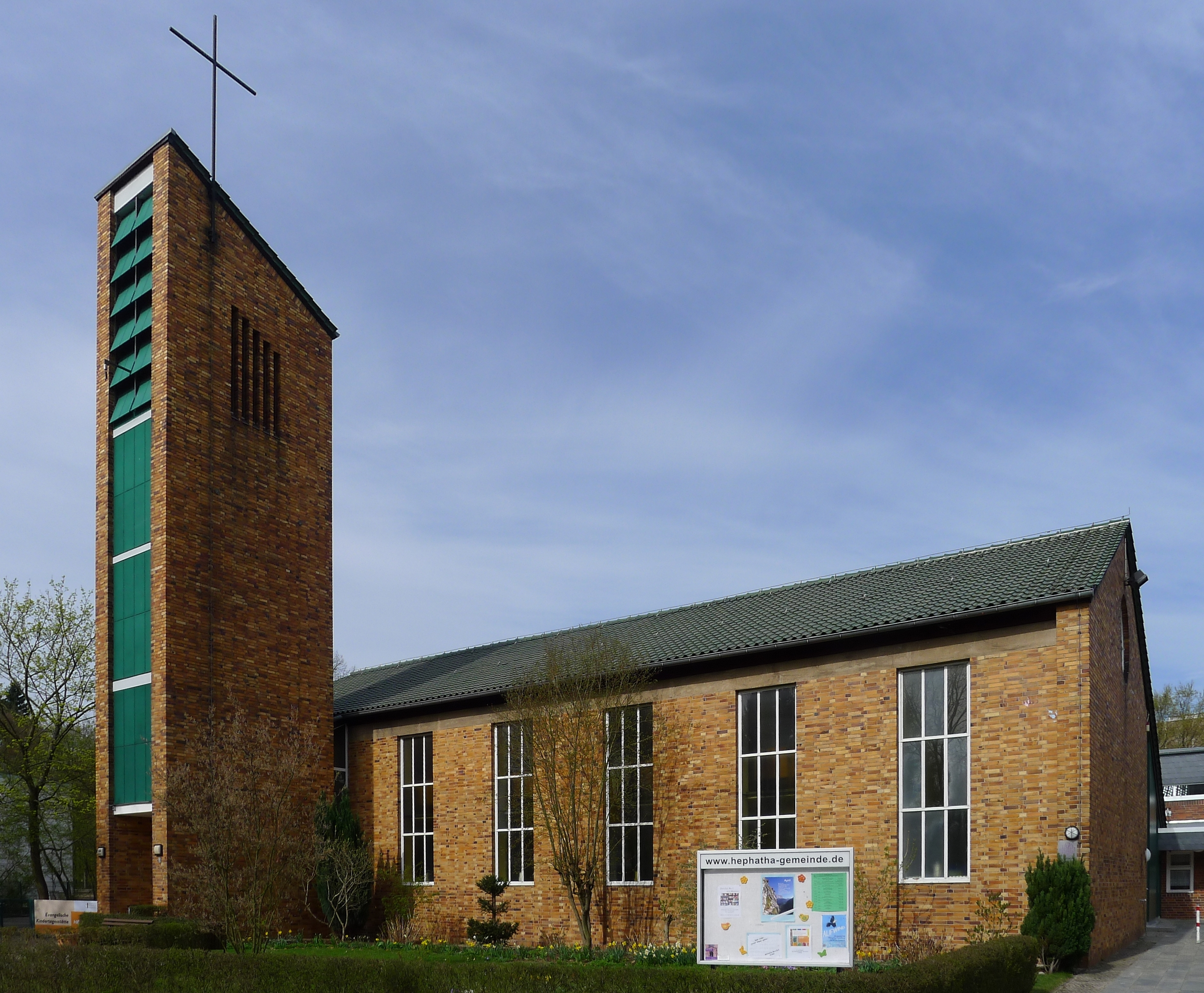 Blick auf die Kirche von der Straße